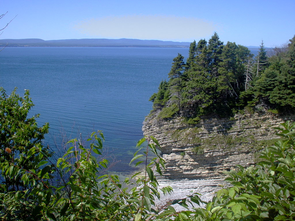 Vue de la baie de Gaspé à partir du Parc Forillon